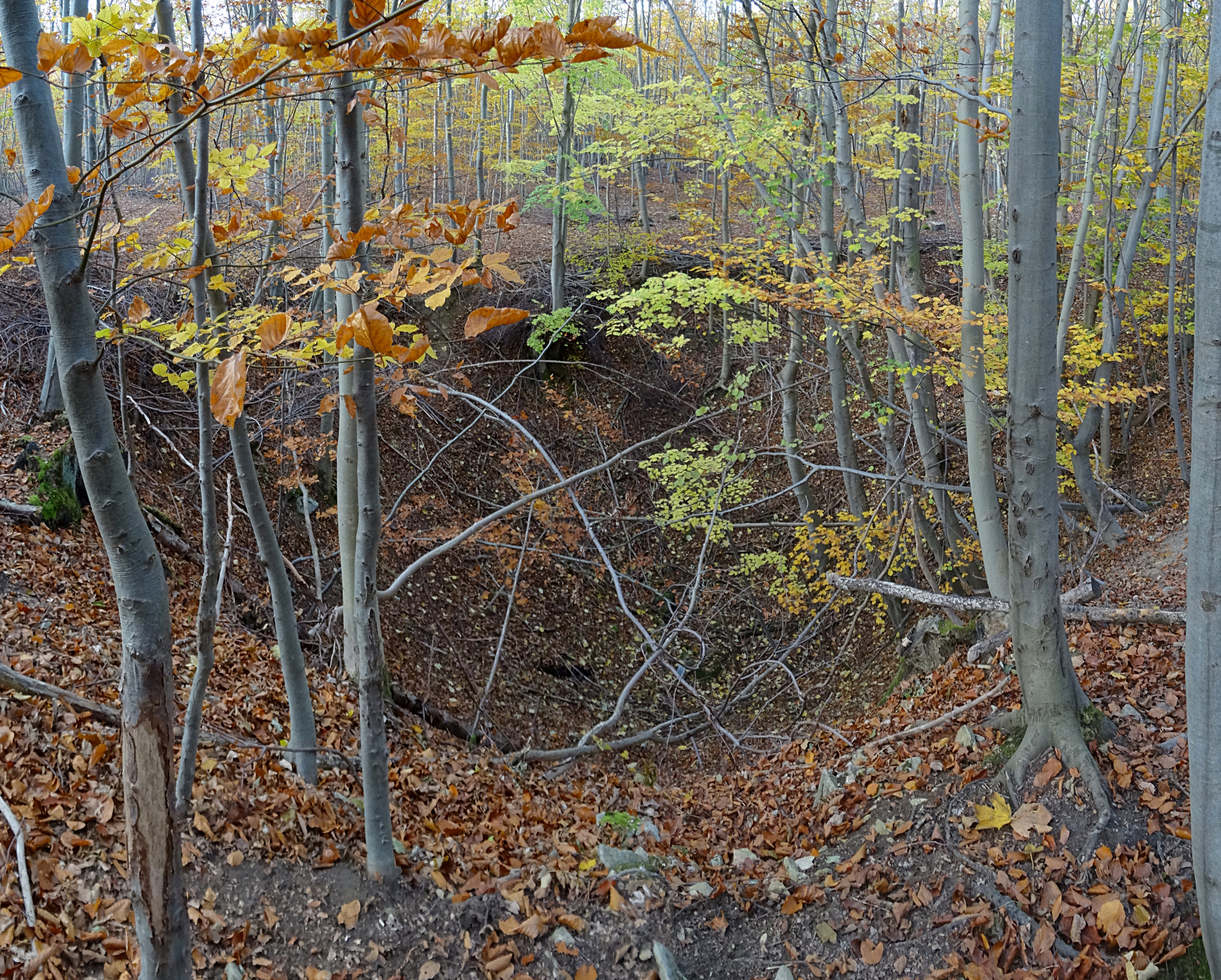 Die zahlreichen Erdfälle im Muschelkalk nördlich von Osterwieck haben den Namen Fallstein gegeben.